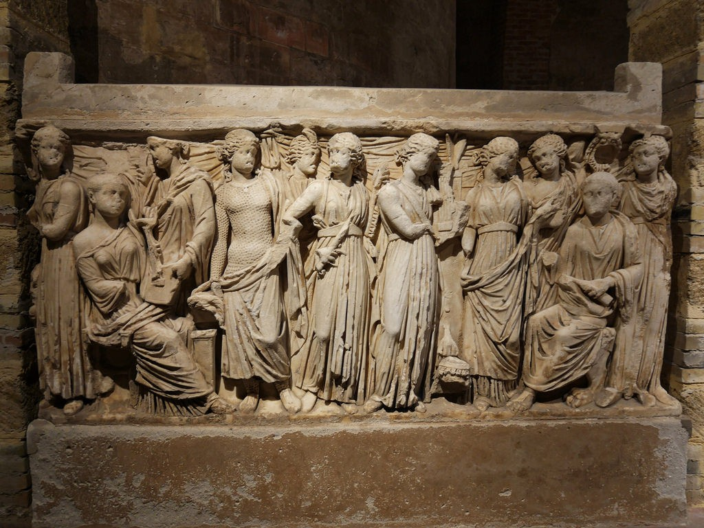 Cattedrale